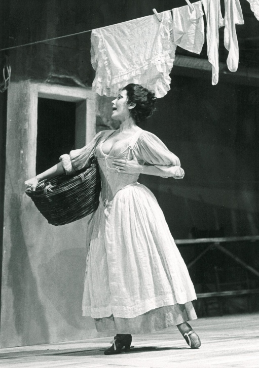 Teatro stabile di Genova “La putta onorata” di C. Goldoni Regia di M. Sciaccaluga Foto: Grazia Maria Spina (ruolo di Catte)